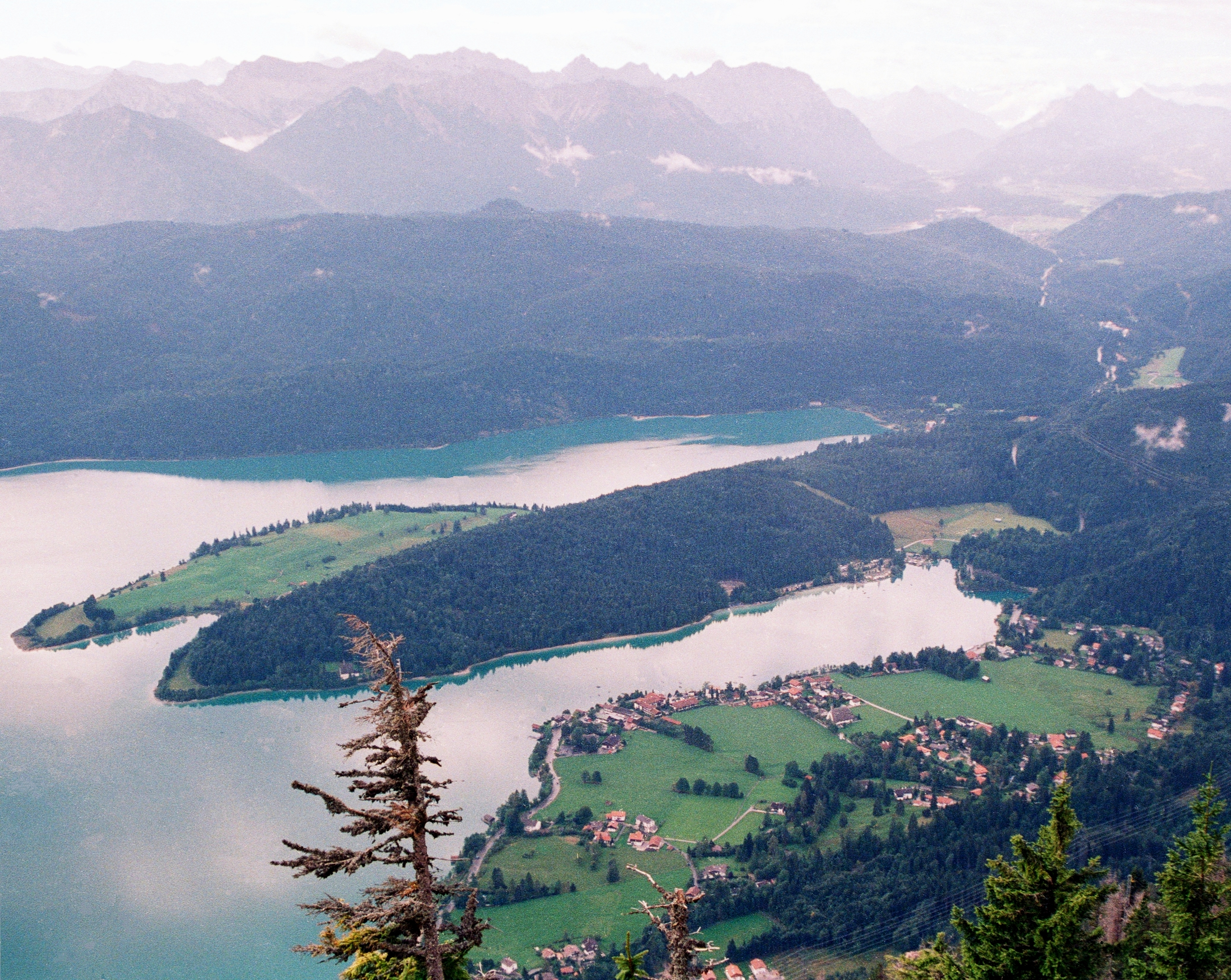 Halbinsel Zwergern im Walchensee